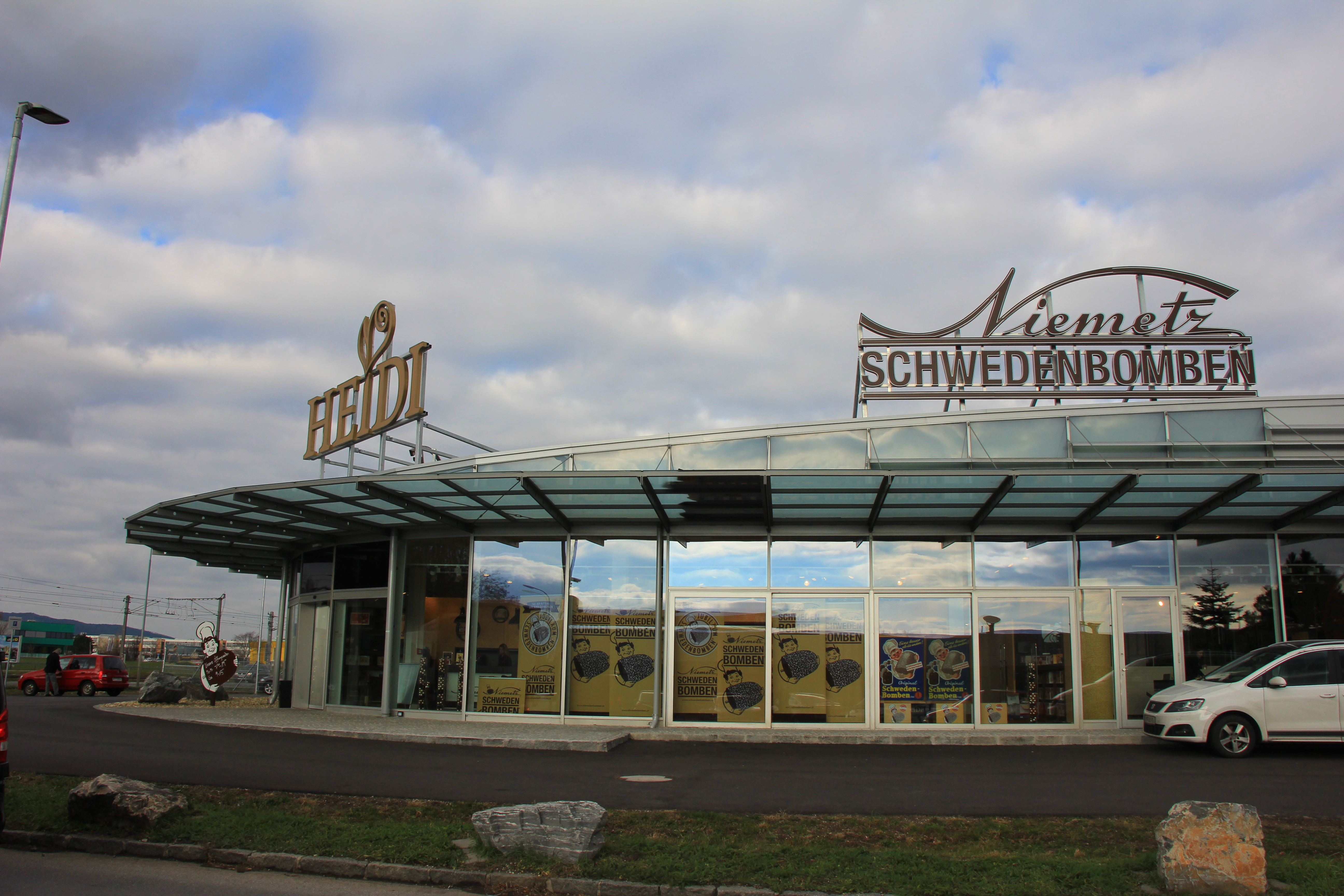 die neue Produktionsstätte von Niemetzschwedenbomben im IZ NÖ Süd in Wiener Neudorf